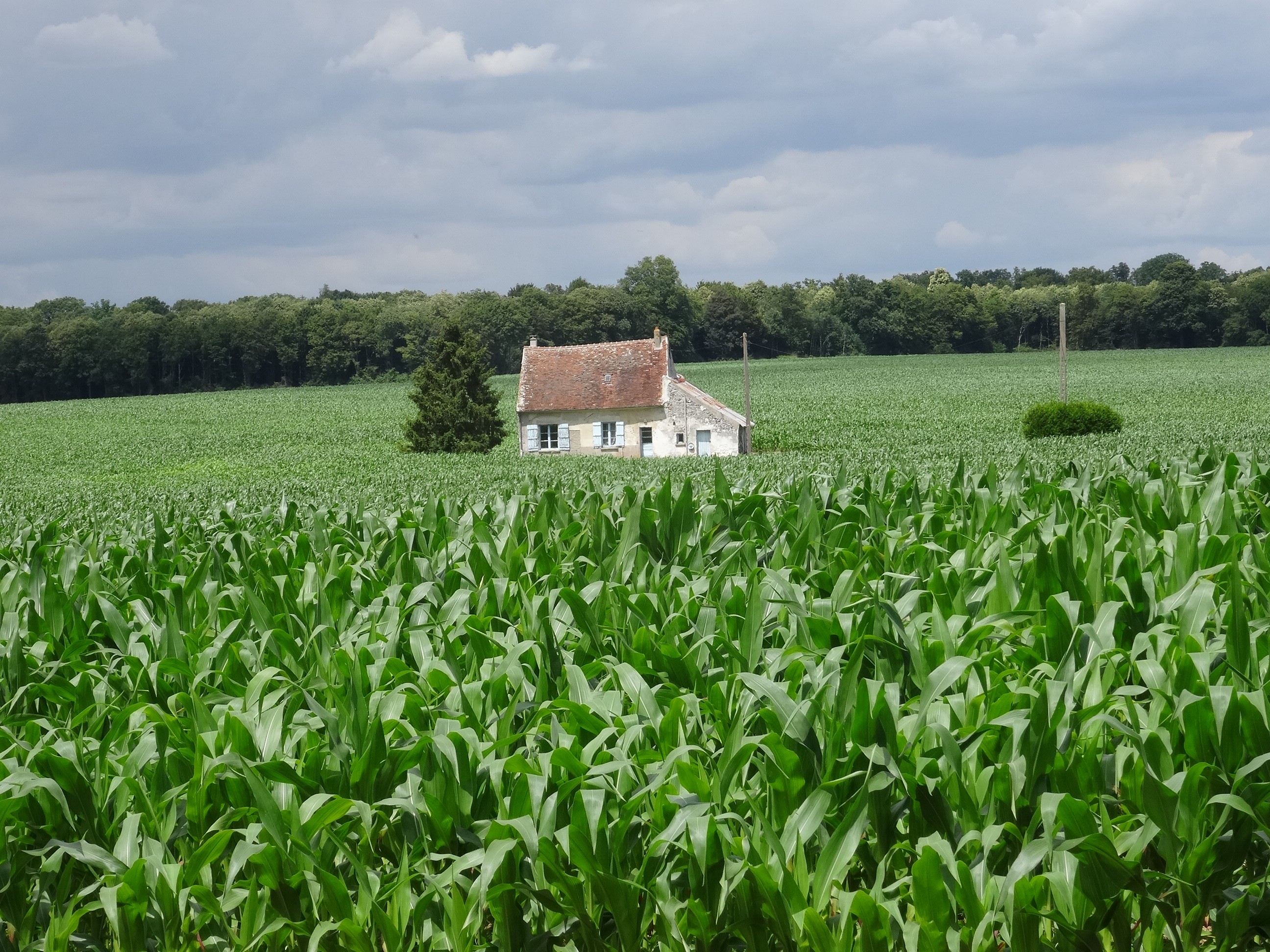 Clairière centrale de la Forêt Domaniale de Choqueuse. (Seine-et-Marne, région Île-de-France).